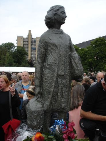 Anne Frank, Merwedeplein, Amsterdam, by Jet Schepp Foto met toestemming eigenaar en maker J.Wiersema geplaatst.